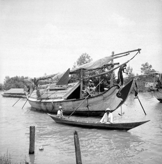 Negatief. Een zeilschip en een roeiboot op de Sambas-rivier in West-Borneo